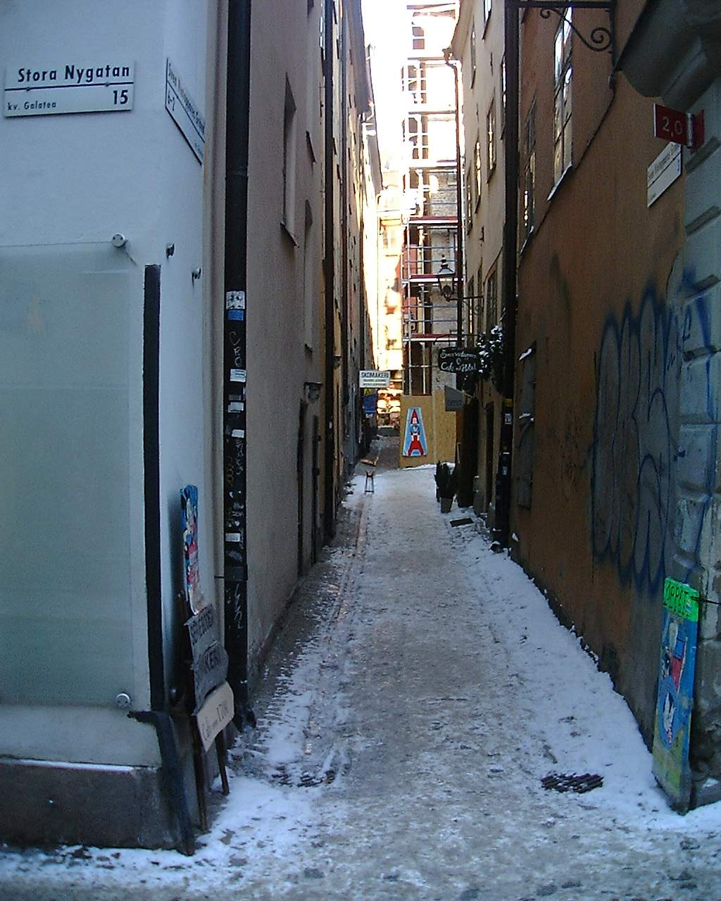 Sven Vintappares Gränd in Gamla stan.